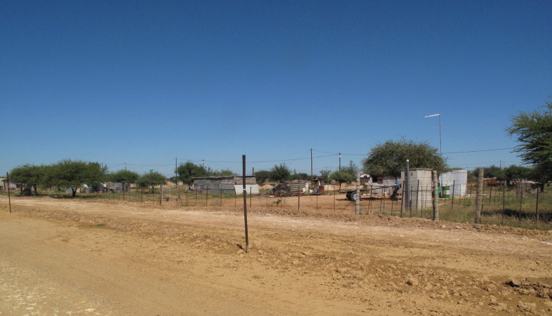 Schmidtsdrif